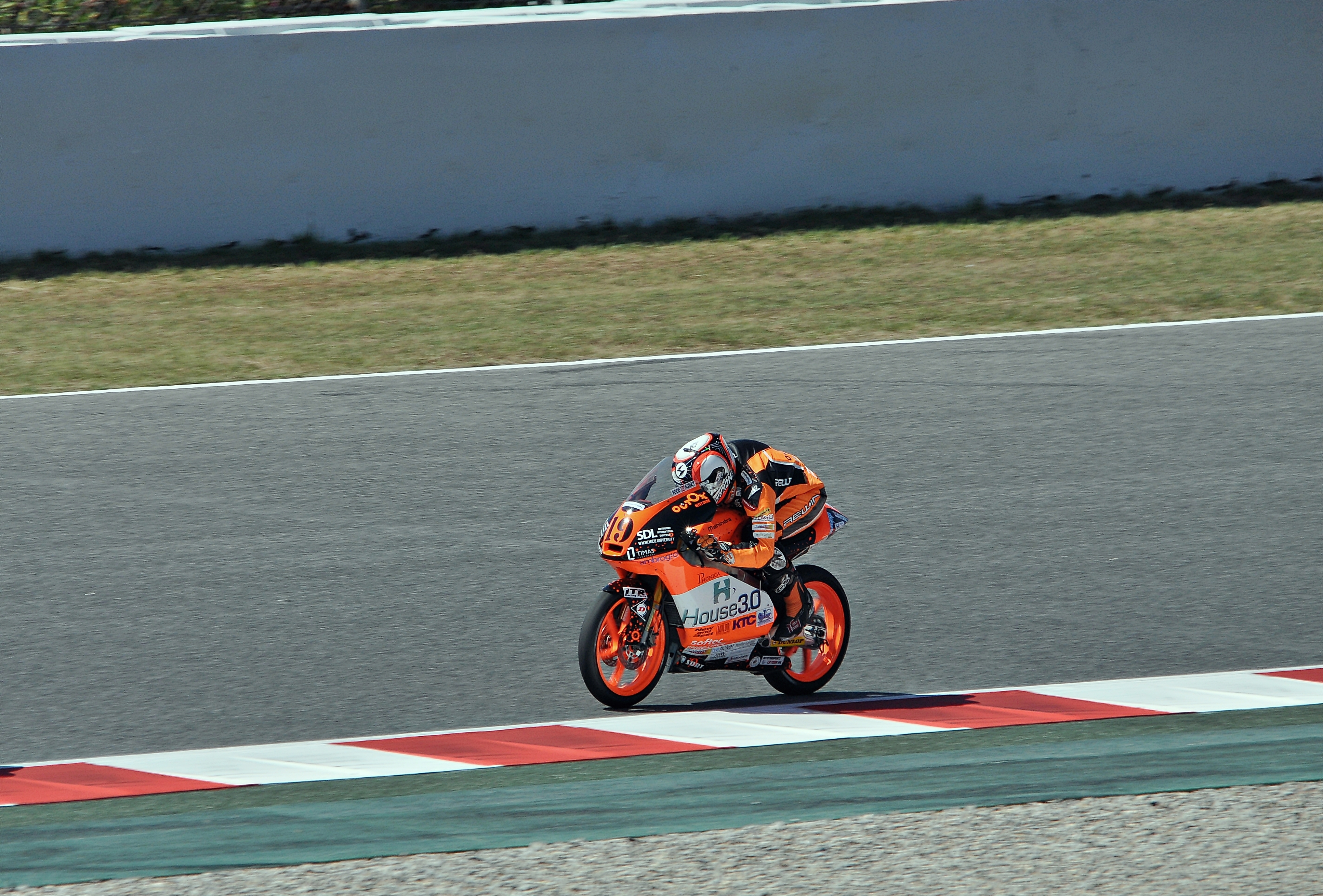 gran premio de cataluña